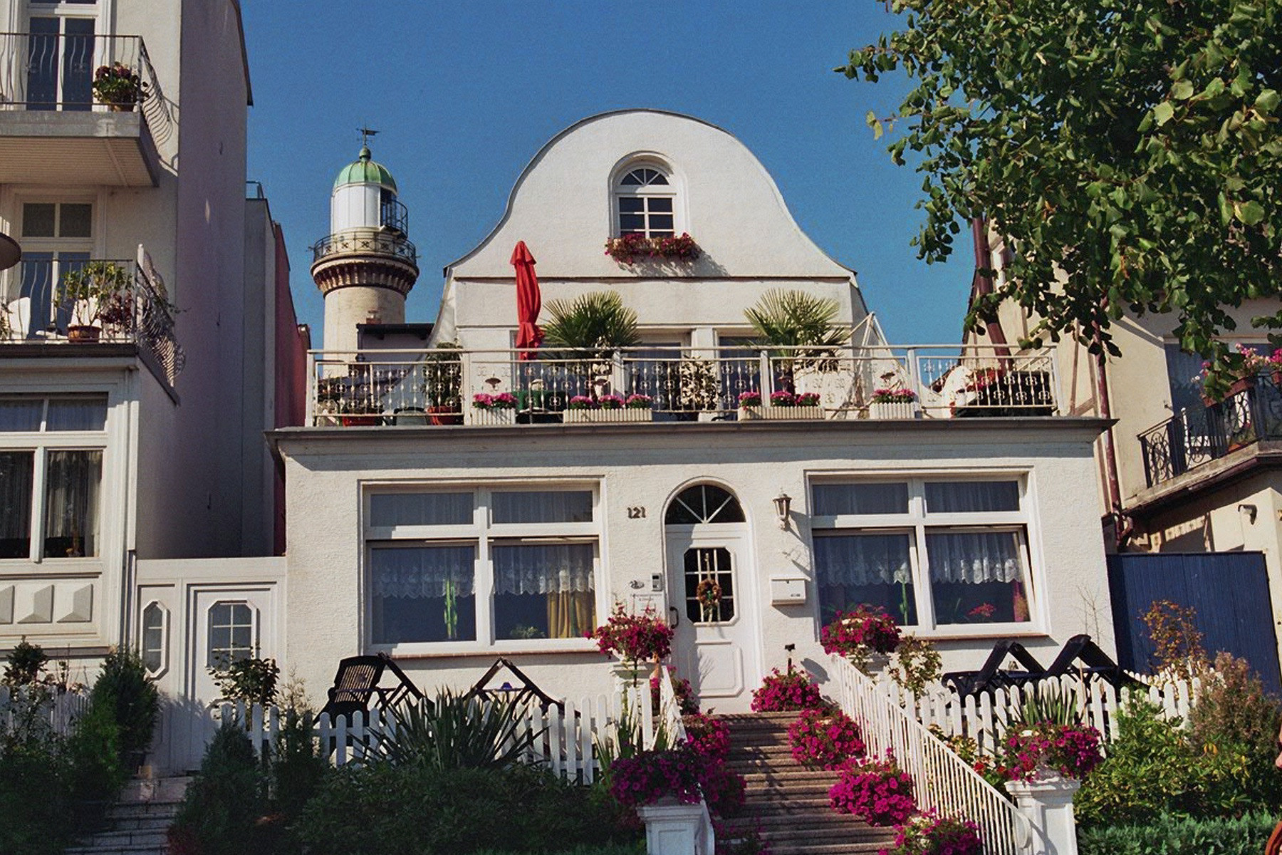 Rostock-Warnemünde: Haus am Strom, im Hintergrund der Leuchtturm